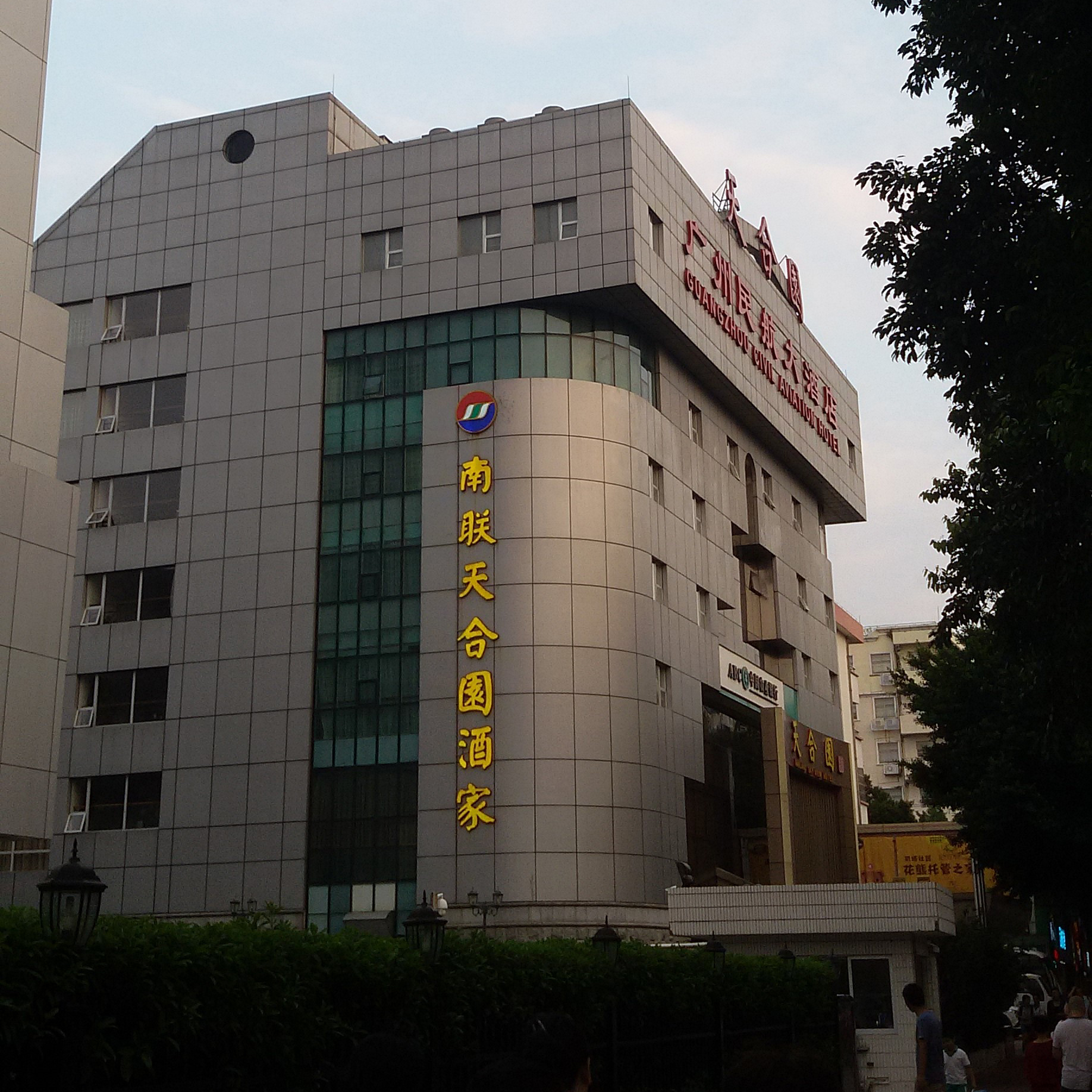 粵語: 廣州民航大酒店